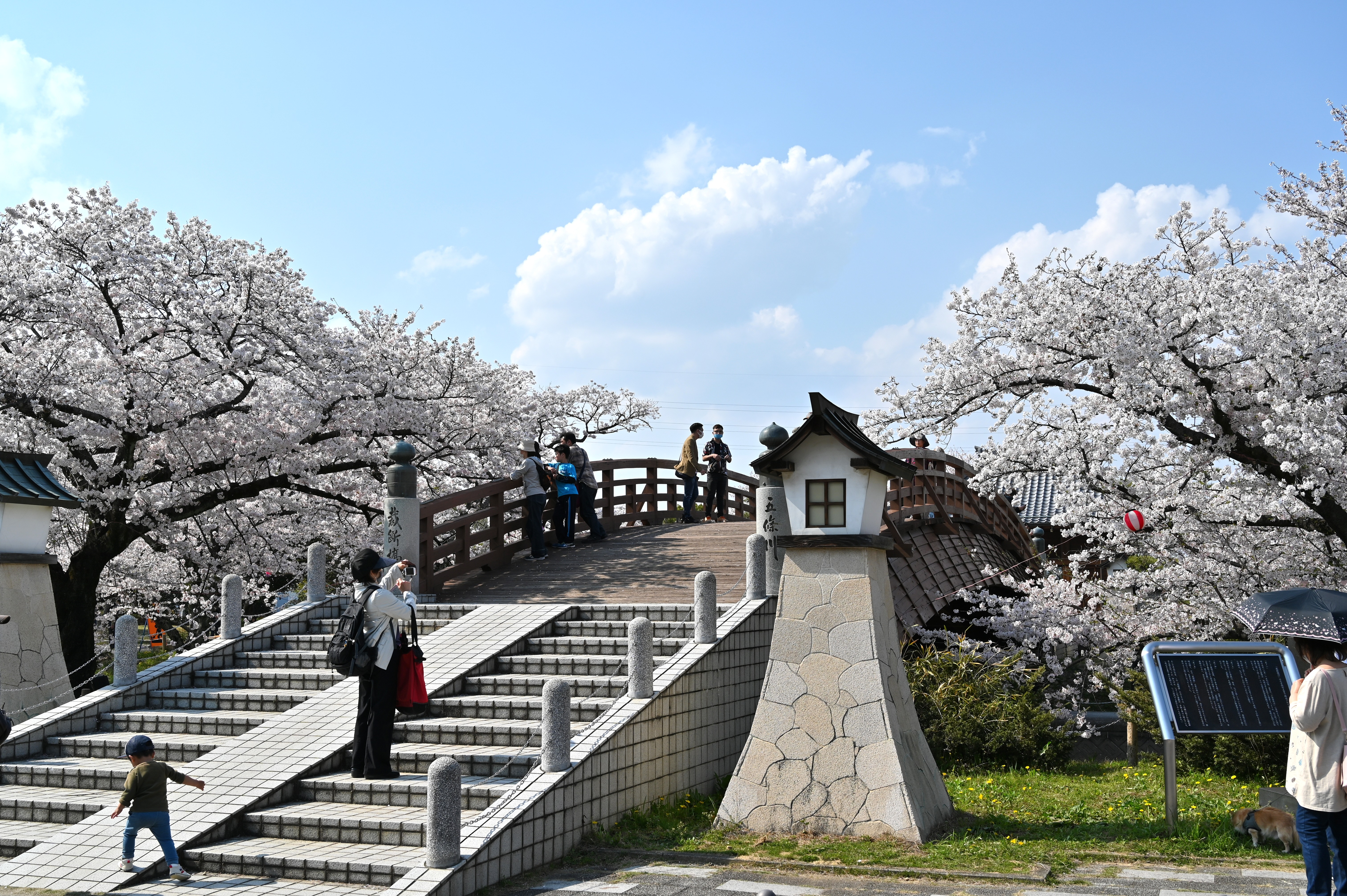 堀尾跡公園の裁断橋